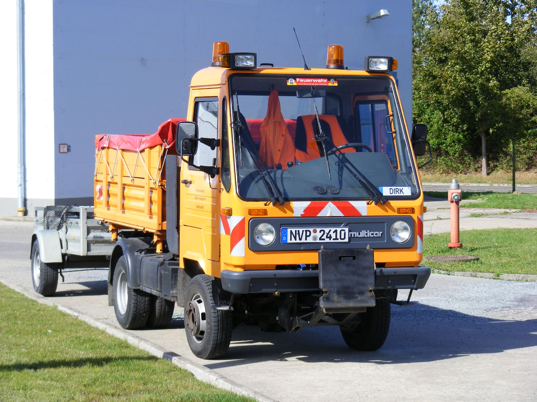 Ein Multicar M 26 Laster.